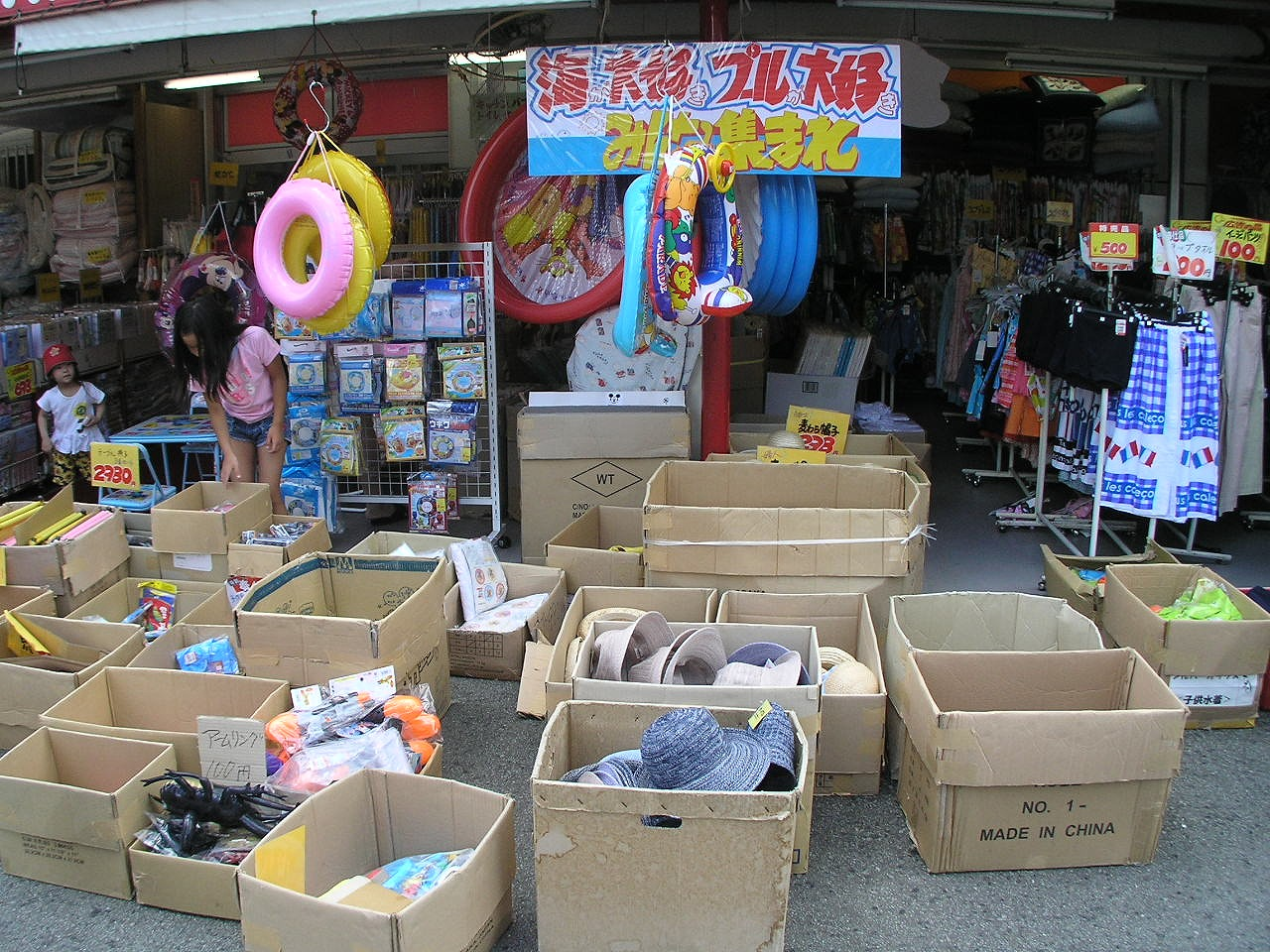 バッタ屋の店頭 三田市タキブチ